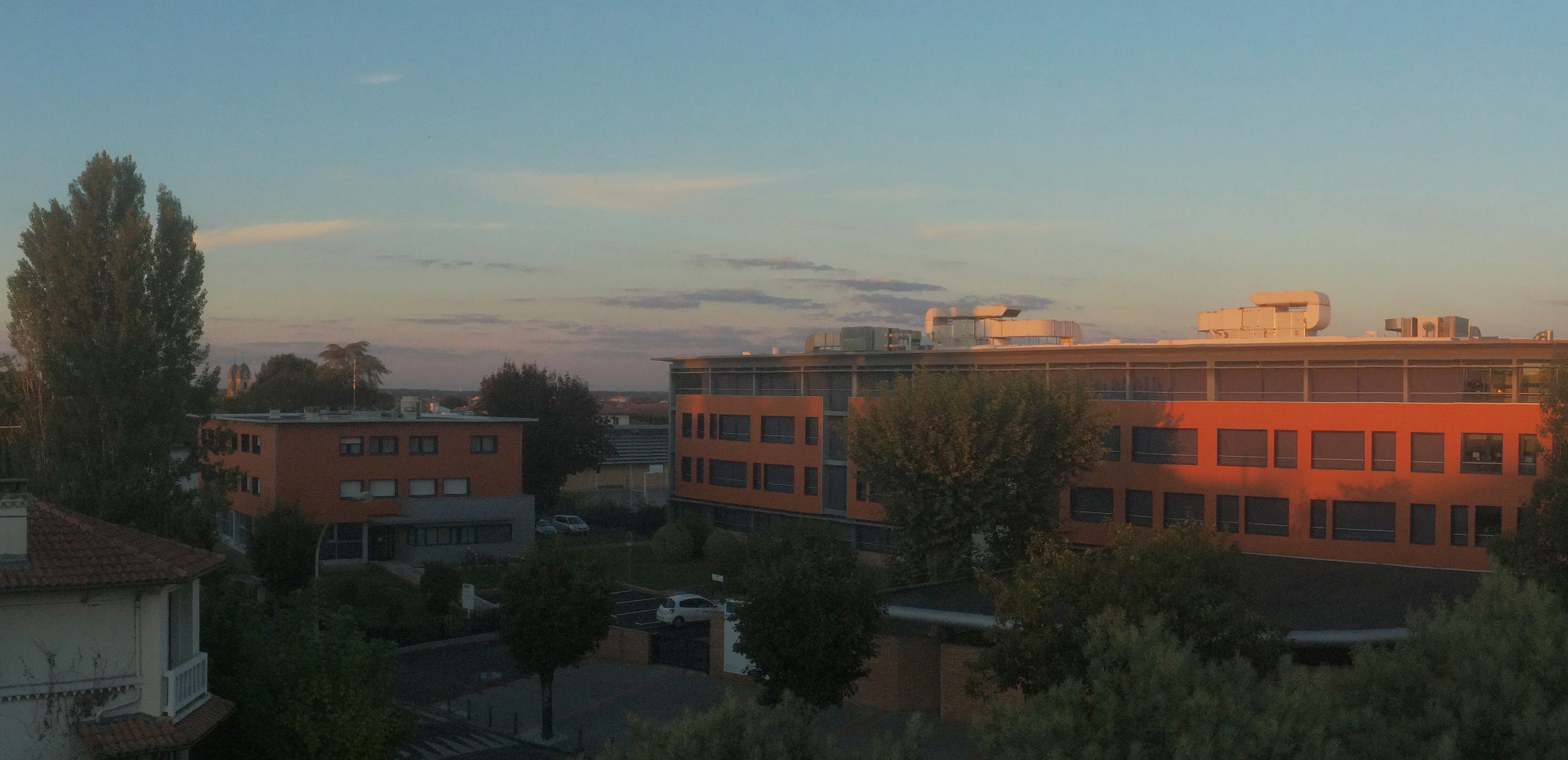 Lycée de Borda, vue aérienne depuis l'avenue Paul Doumer.